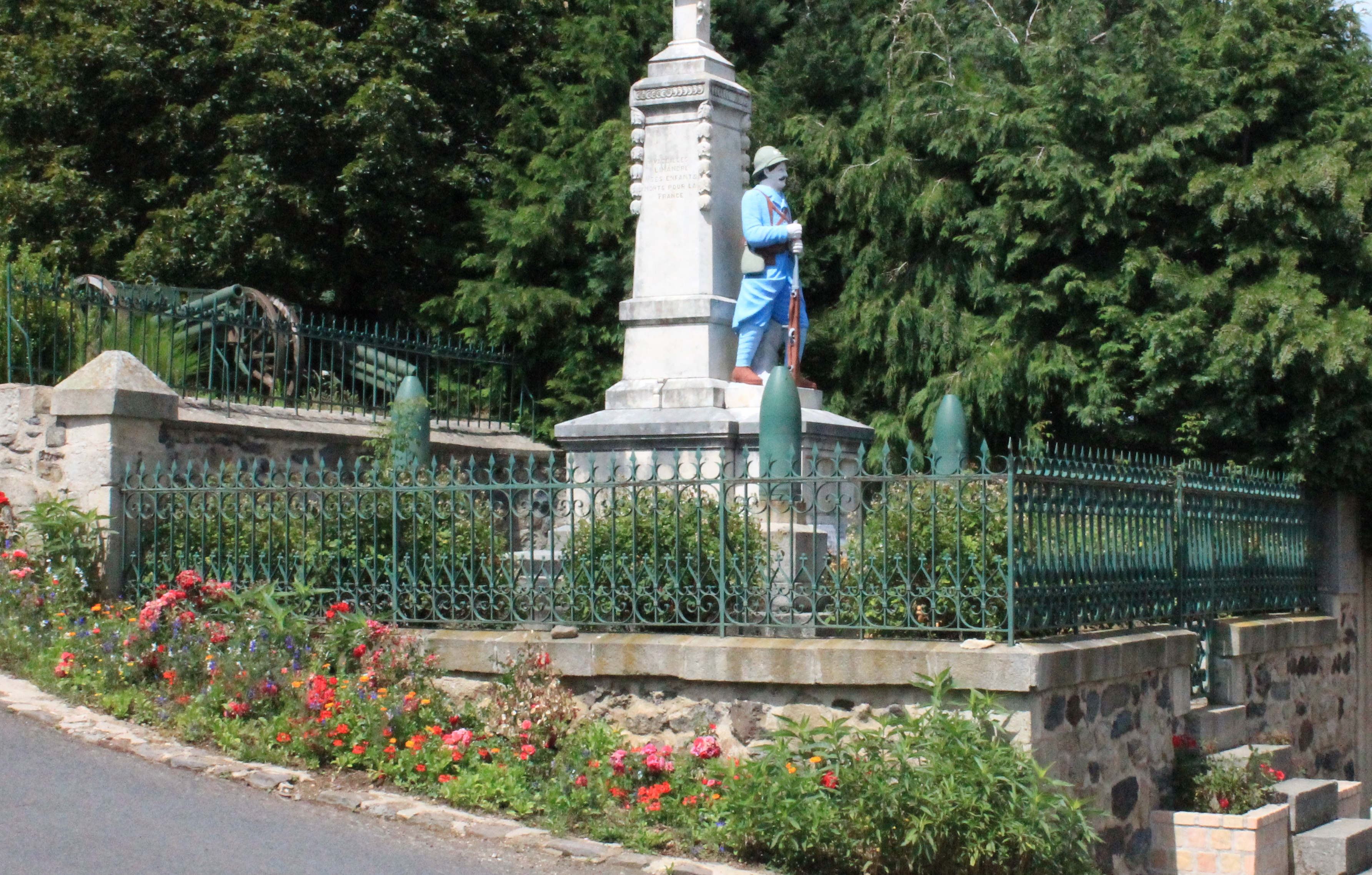 Vazeilles Limandre